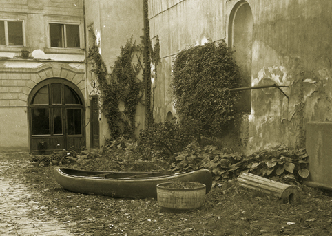 Gelatine silver print. Bromolejová fotografie.